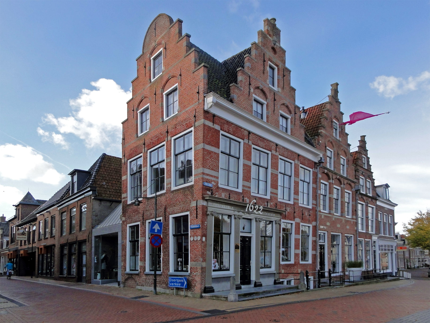 De Zijl 1 Dokkum. rijksmonument